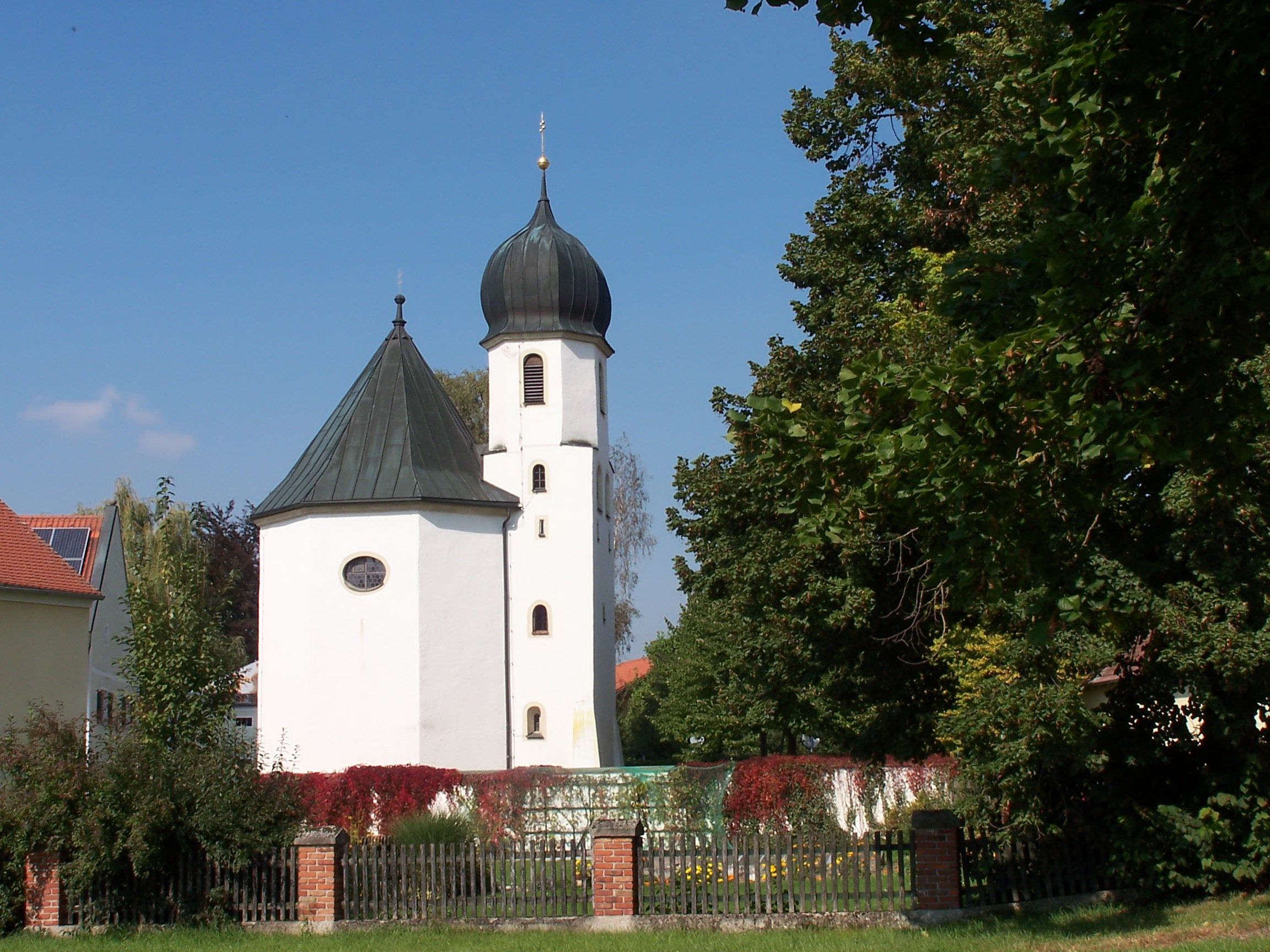 Katholische Nebenkirche St. Ägidius, achteckiger Zentralbau mit Chorturm und Zwiebelhaube, romanisch, Turm mittelalterlich, 1691 barockisiert; mit Ausstattung; Friedhofsmauer, in der Anlage mittelalterlich.